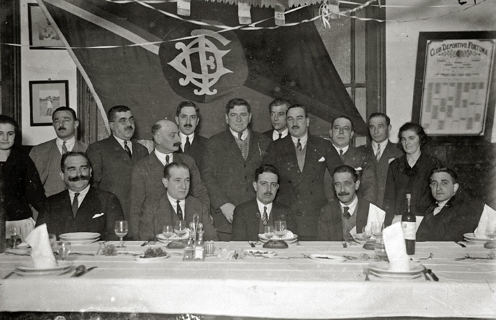 Título original: Grupo de socios del Club Deportivo Fortuna (1/1) Localización: San Sebastián (Guipúzcoa)